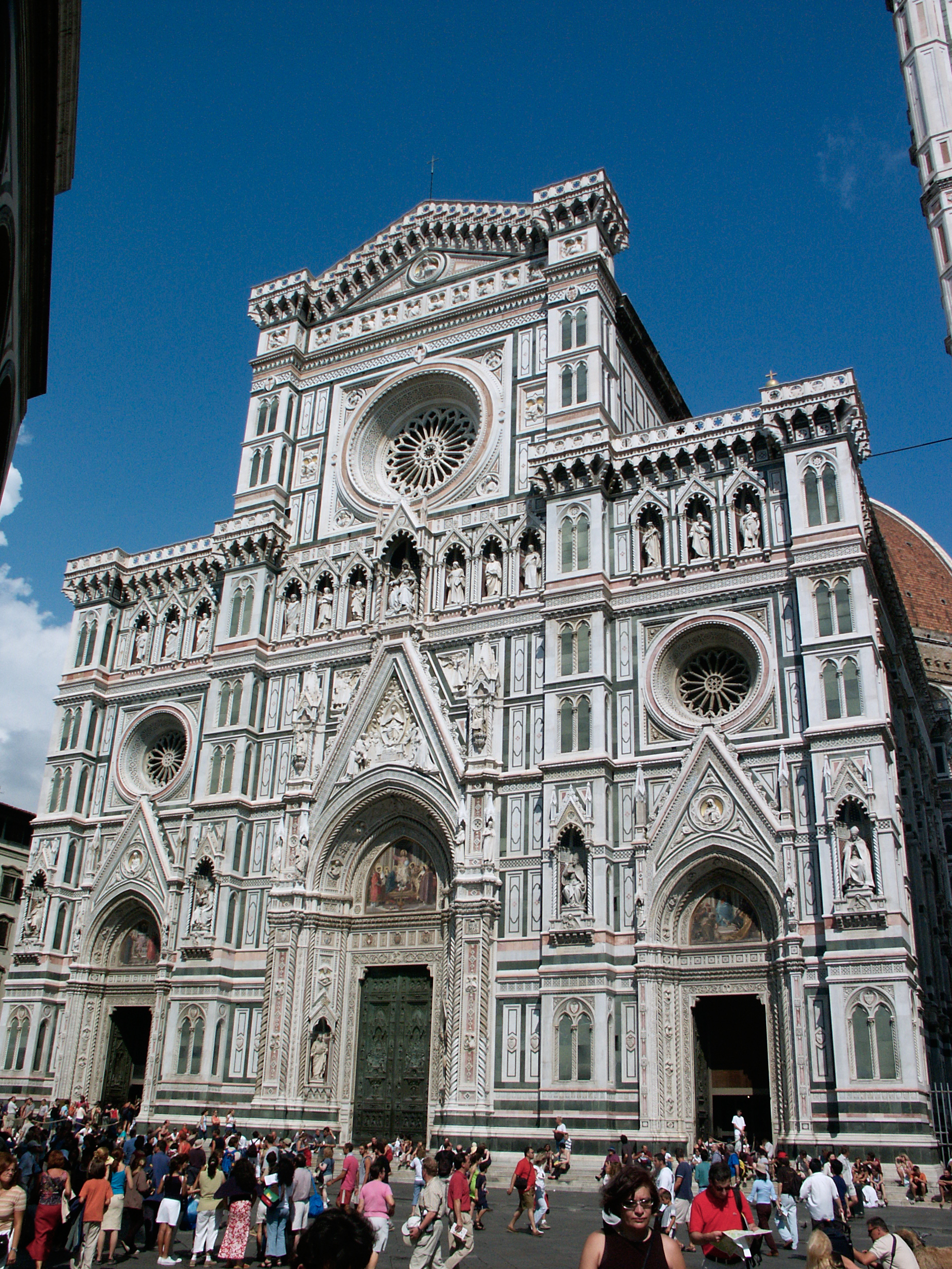 Vue générale de la façade de la cathédrale de Florence